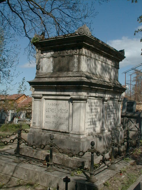 Cimitirul Hajongard Cluj-Napoca